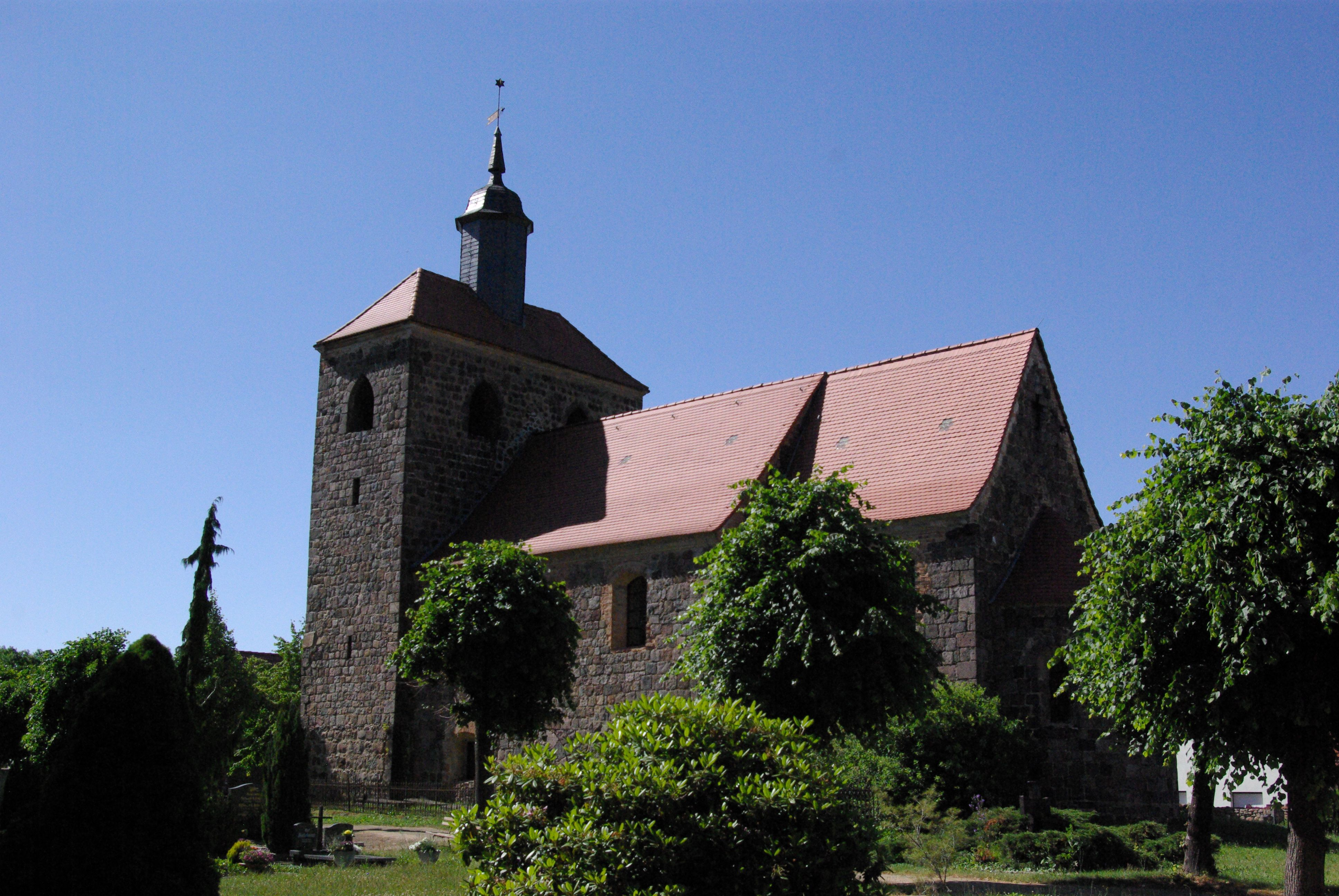 Heideblick in Brandenburg. Die Kirche im Ortsteil Waltersdorf steht unter Denkmalschutz.